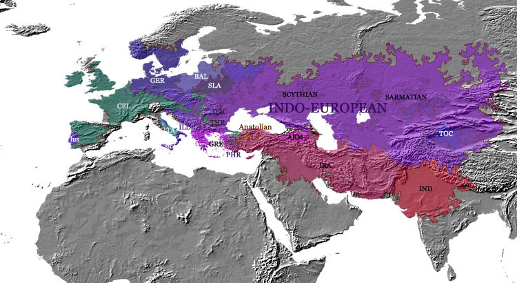 Indo-European expansion around 500 BC.